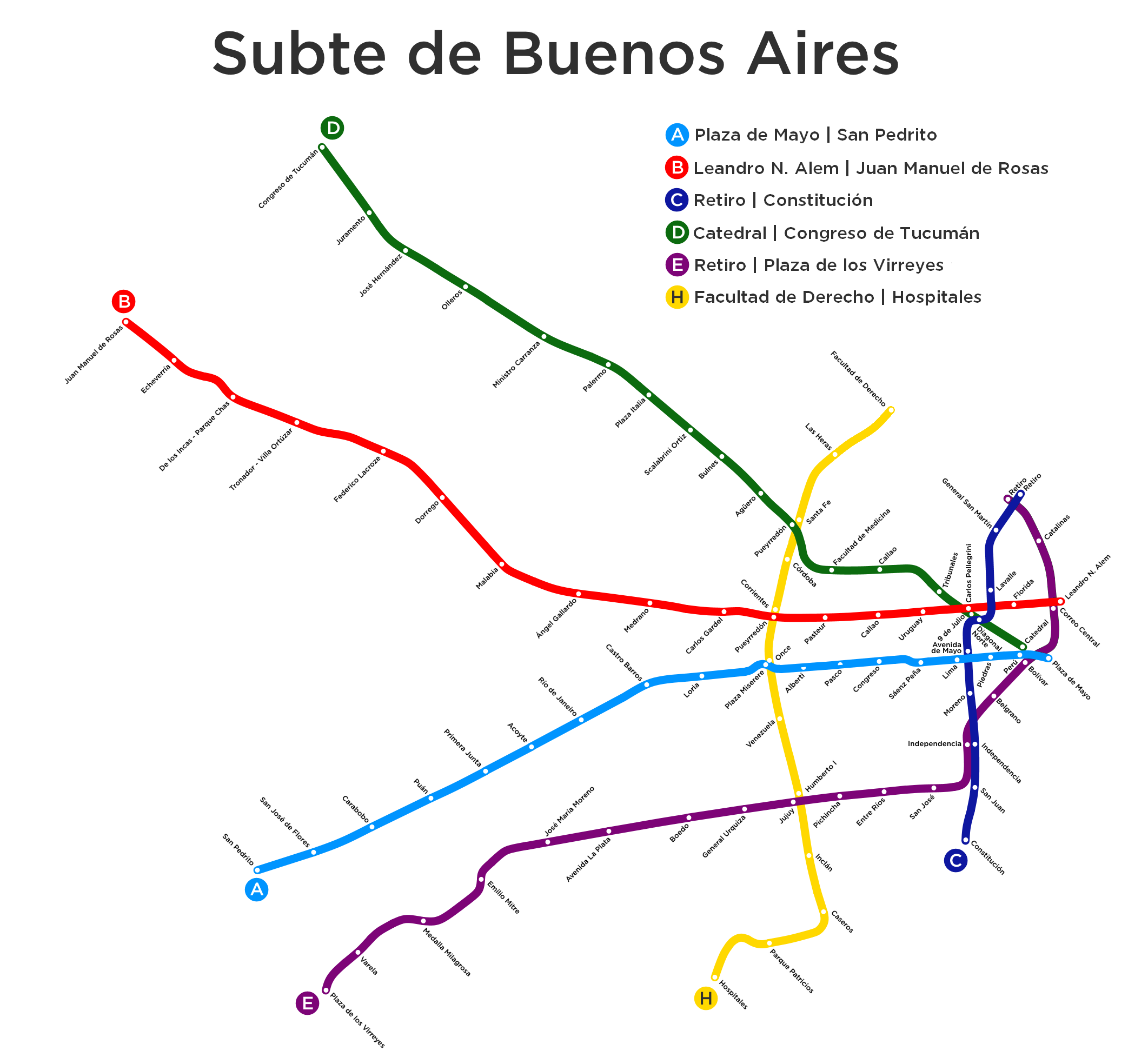 Situación de la red de subterráneos de Buenos Aires a junio de 2019.